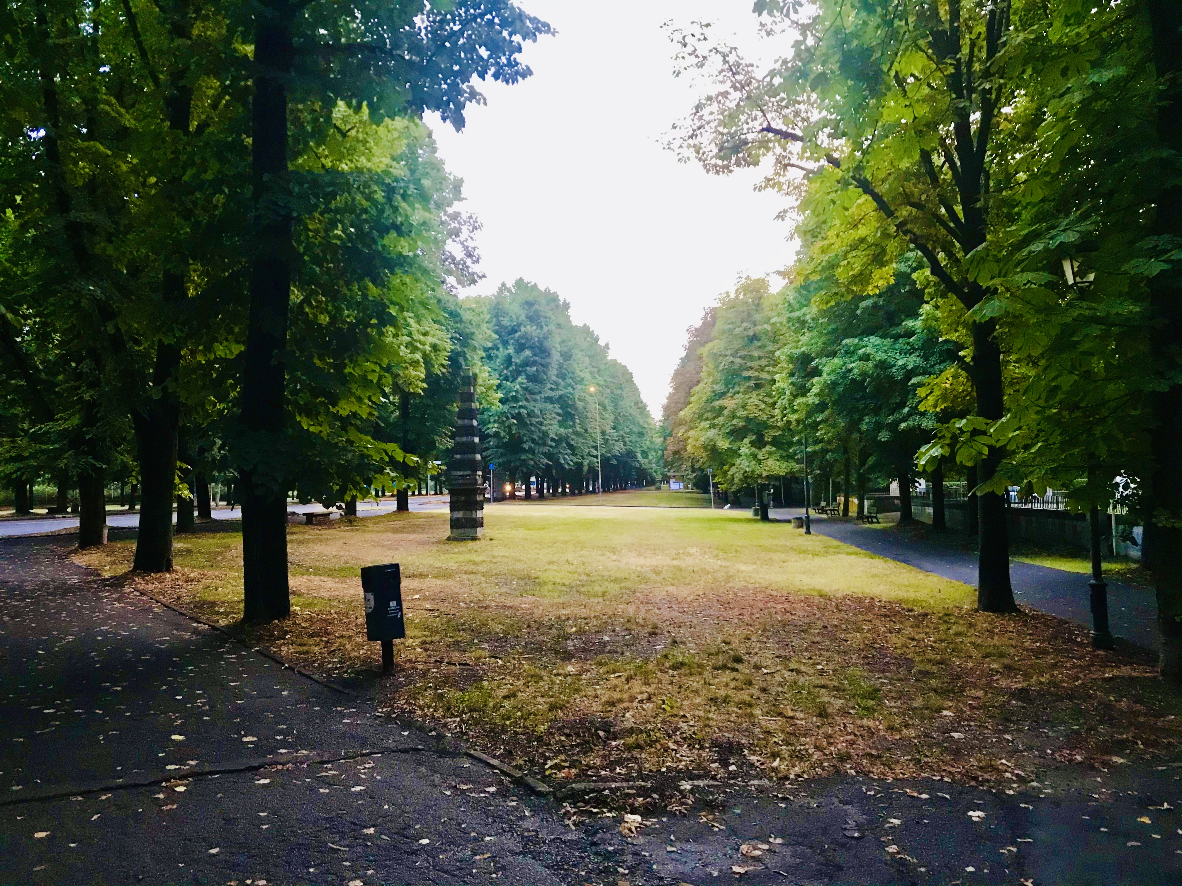 Piazza Cadorna, rotonda sud